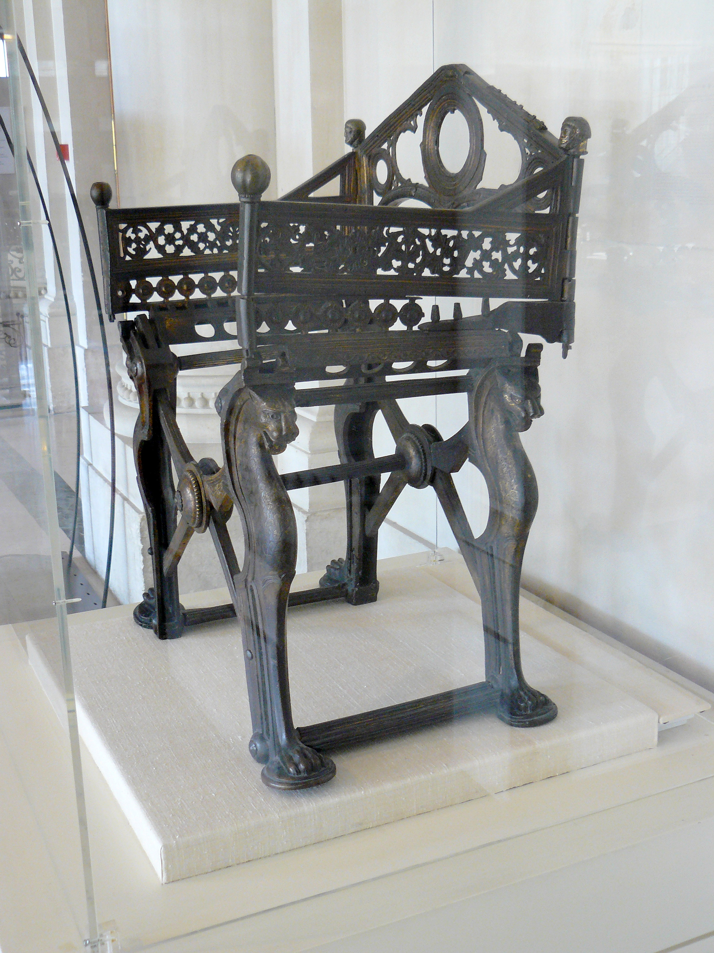 Siège en bronze appelé Trône de Dagobert, époque mérovingienne et carolingienne - Cabinet des médailles de la BNF - Paris - n° Inv : 55-651